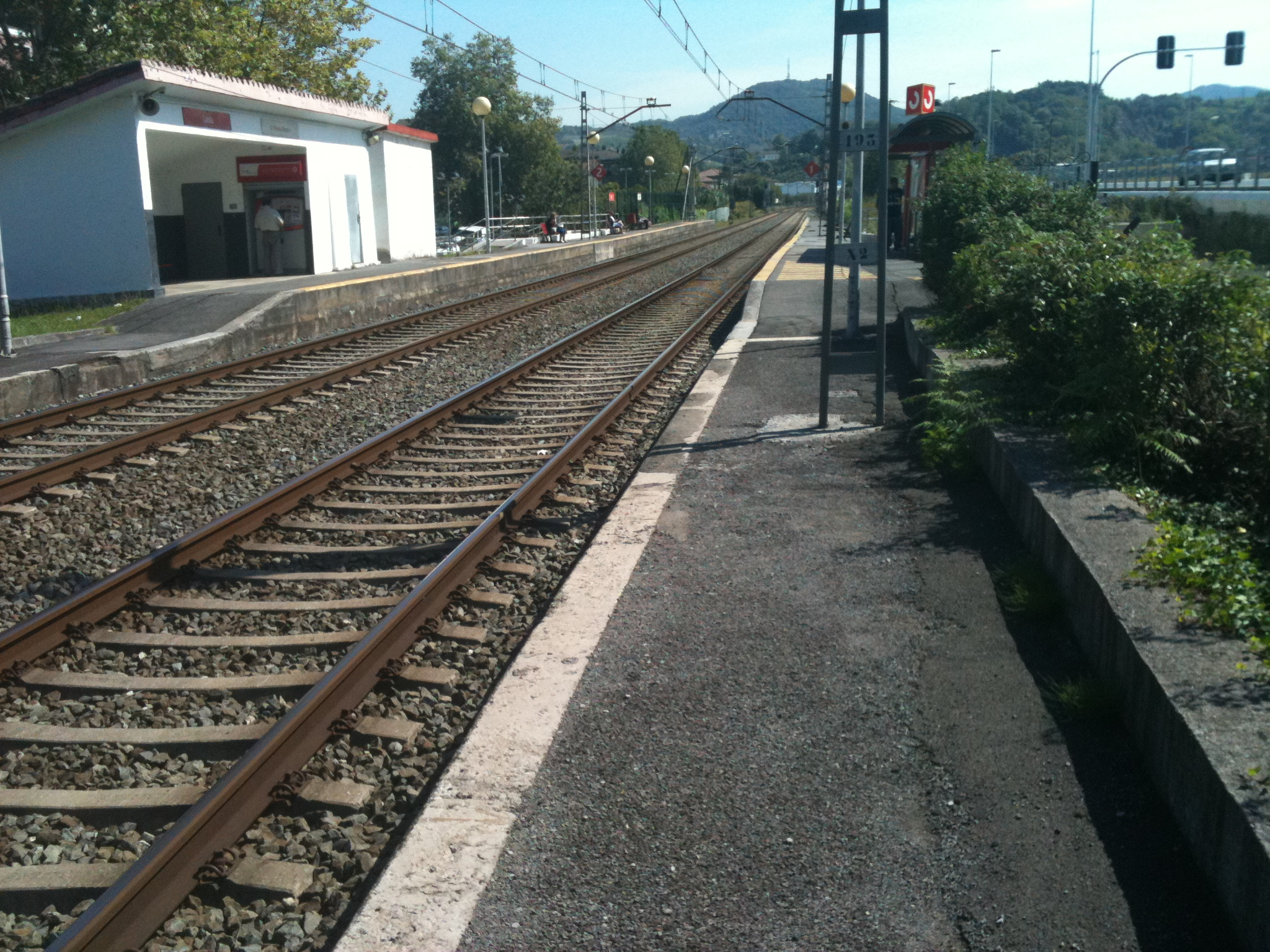 Vista de la estación